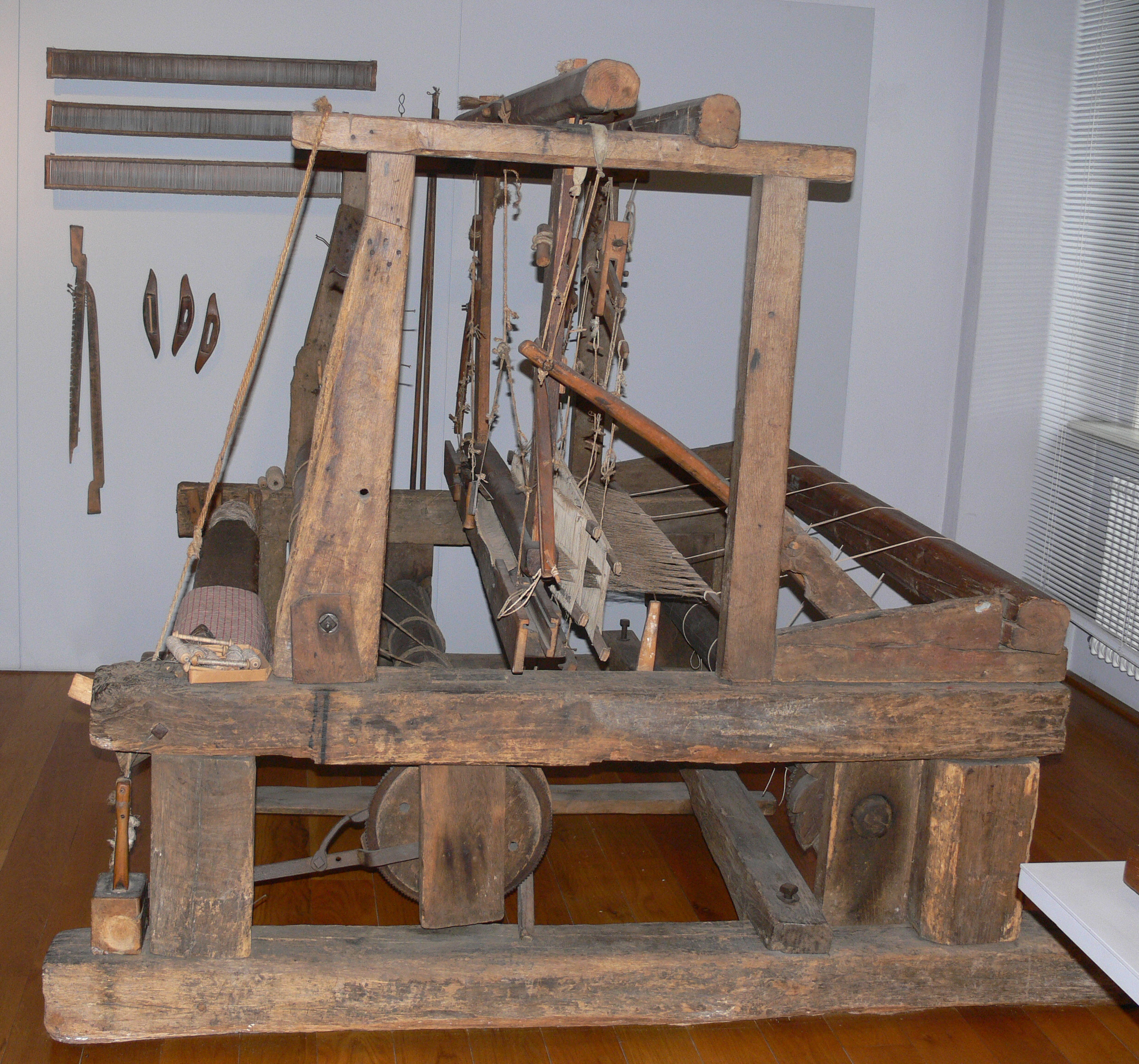 Webstuhl Landesmuseum Württemberg (Außenstelle Museum für Volkskultur in Württemberg, Waldenbuch)